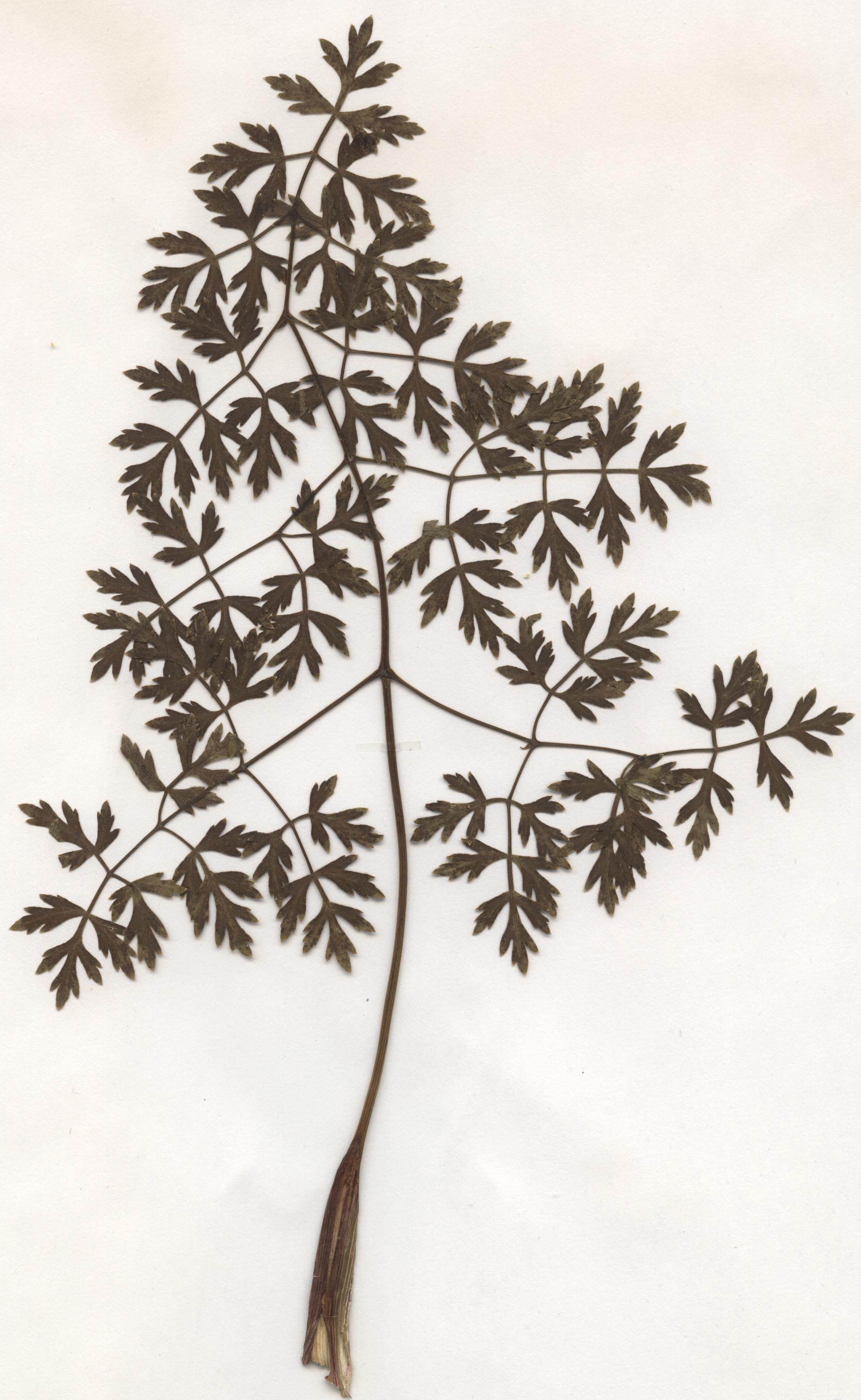 Peucedanum oreoselinum Stängelblatt, eigener Herbarbeleg von 1982, Unterfranken